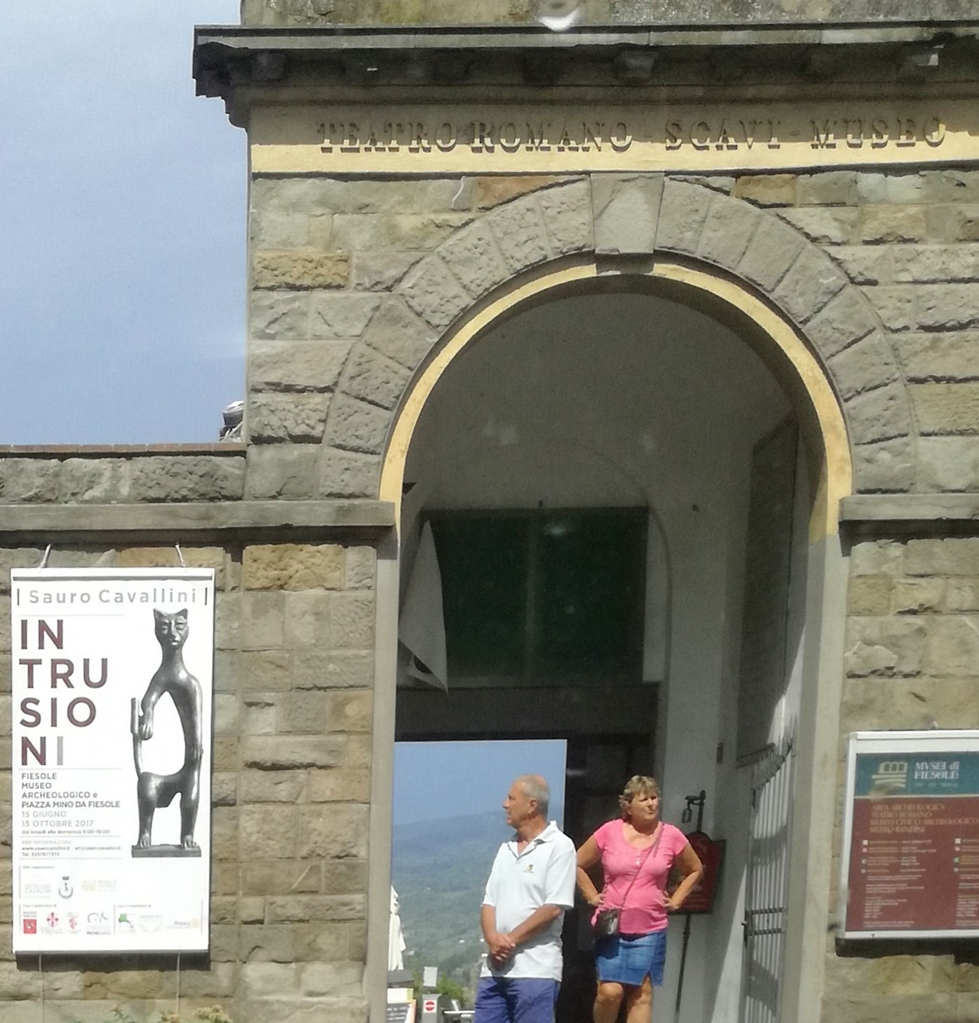 La locandina della mostra Intrusioni di Sauro Cavallini